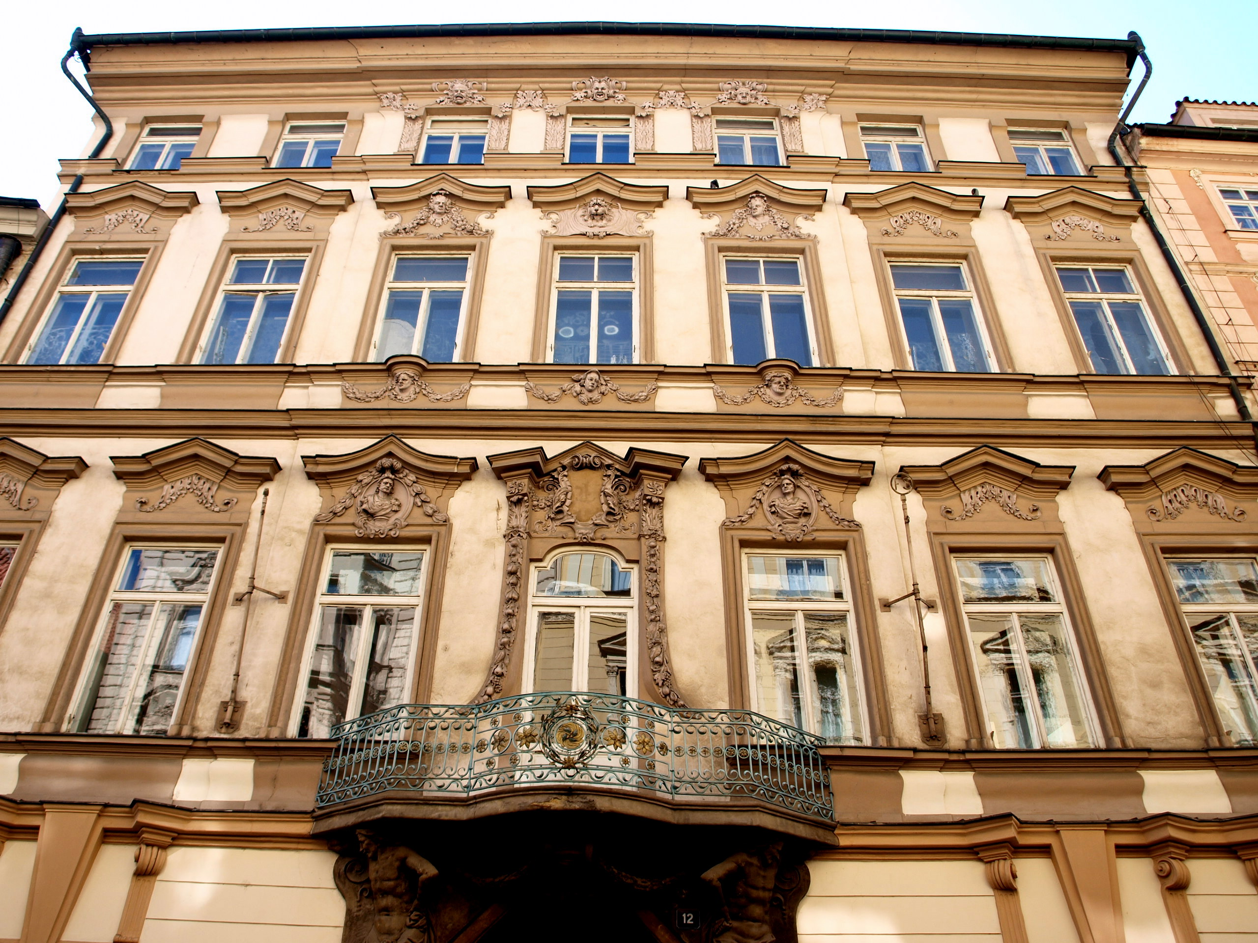 Hrzánský palác